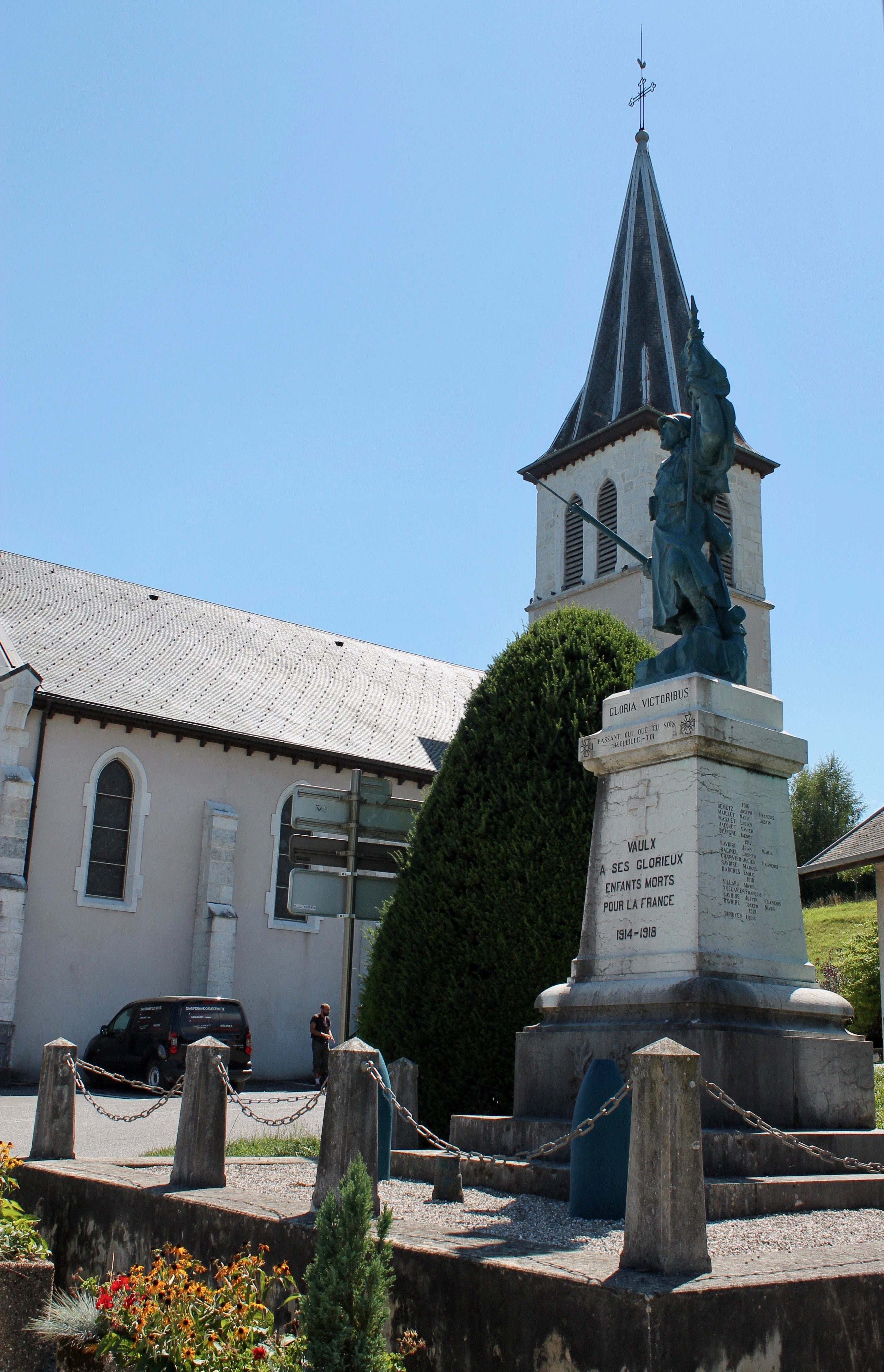 Église Saint-Pierre et Monument aux Morts de Vaulx (Haute-Savoie).